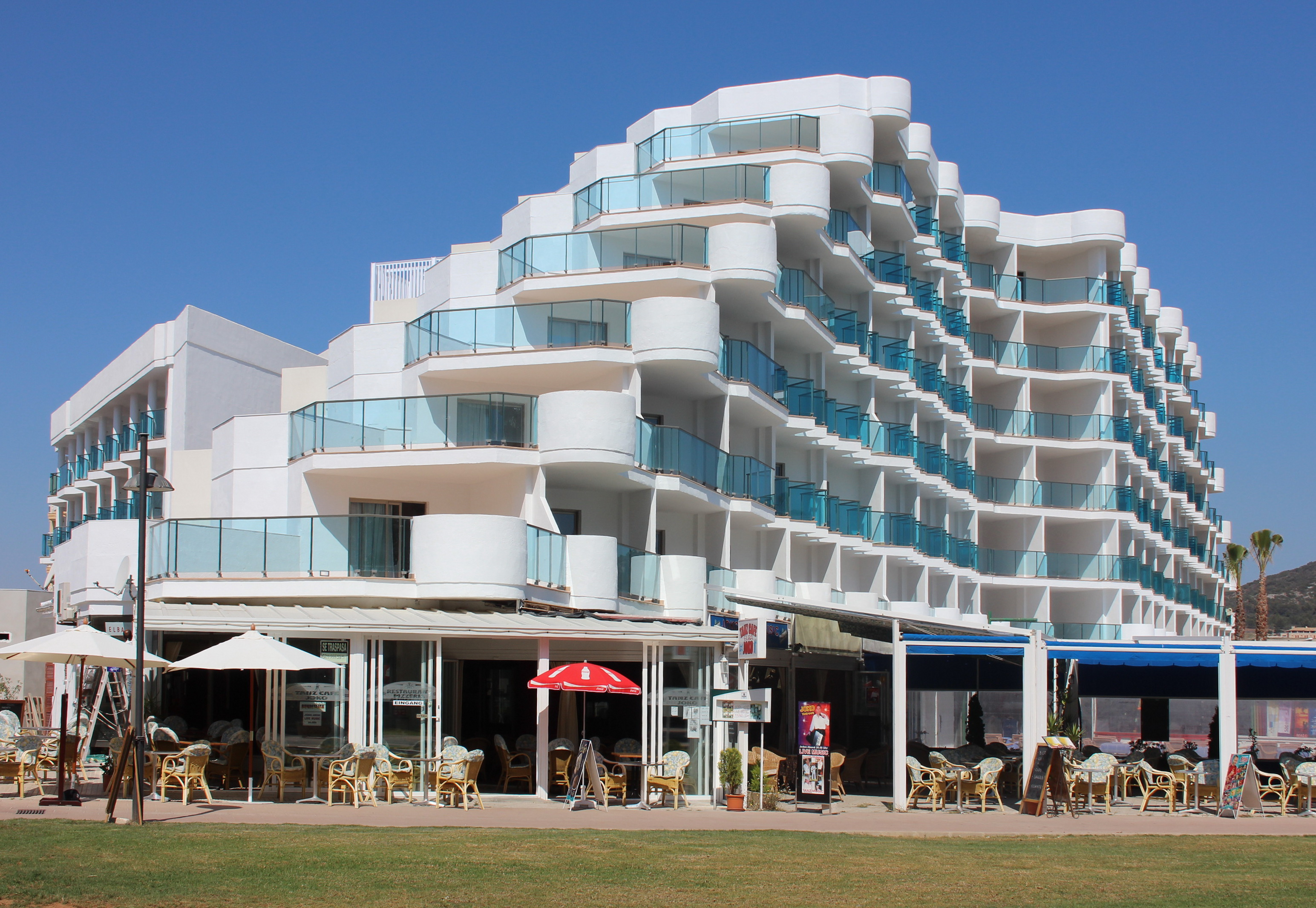 Neubau des Parkhotels in Cala Millor - noch nicht in Betrieb.